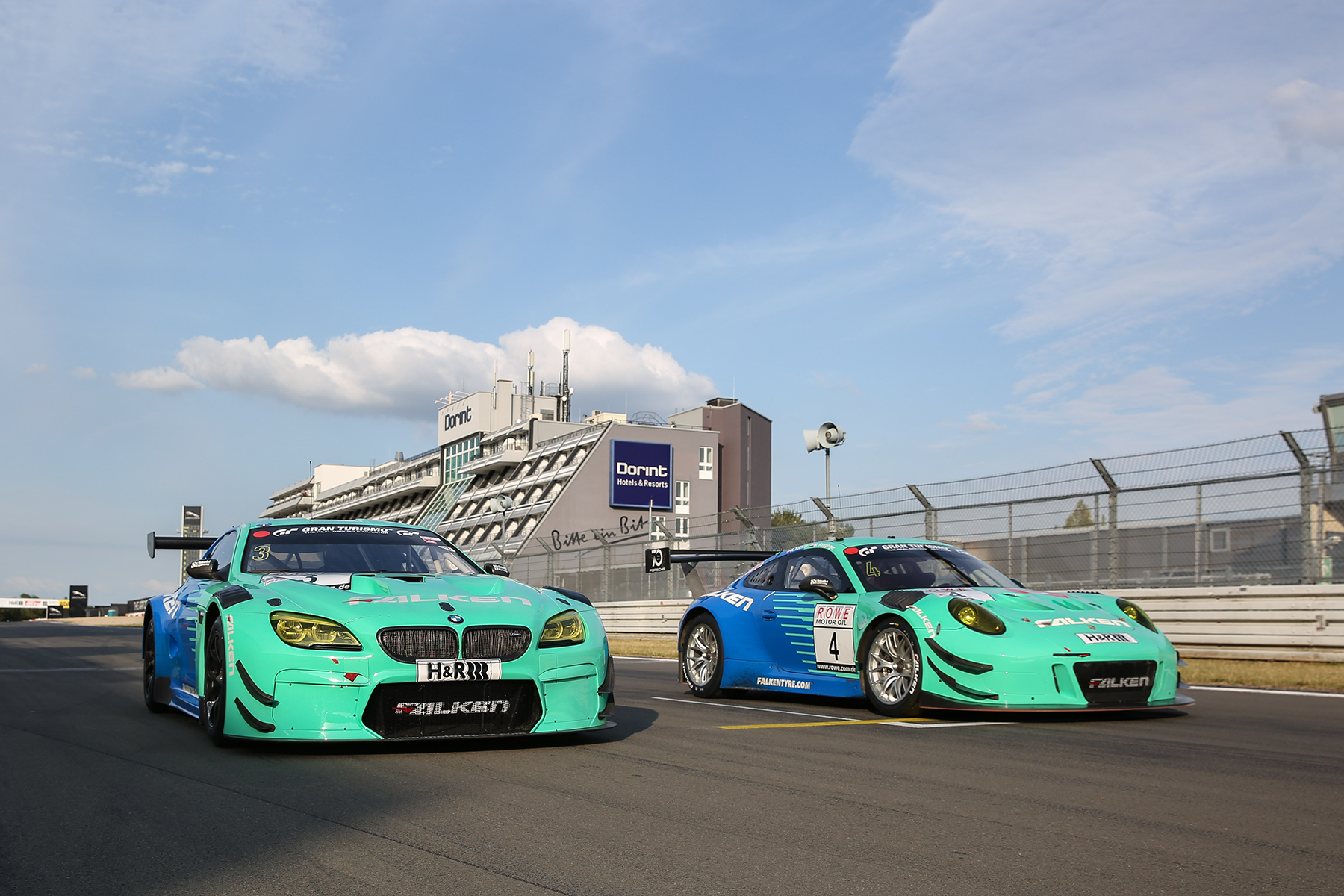 Falken Motorsports BMW M6 und Porsche